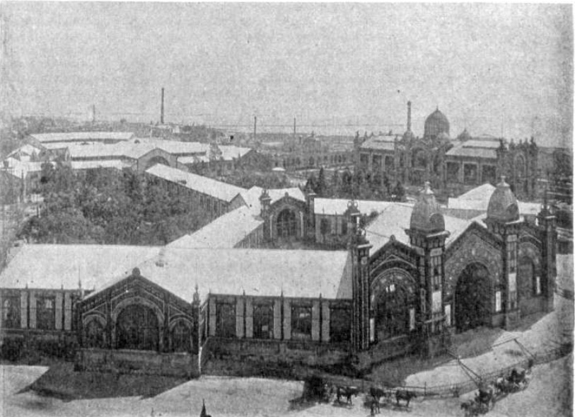 Vista de la Exposición Nacional de 1898, montada en Plaza San Martín, Buenos Aires por el Gobierno Nacional. Se ven en primer plano un conjunto de pabellones temporales de hierro y vidrio, y al fondo el conocido Pabellón Argentino que se mantuvo frente a la plaza hasta 1932, cuando fue demolido para ampliar el parque hasta la Avenida Alem.